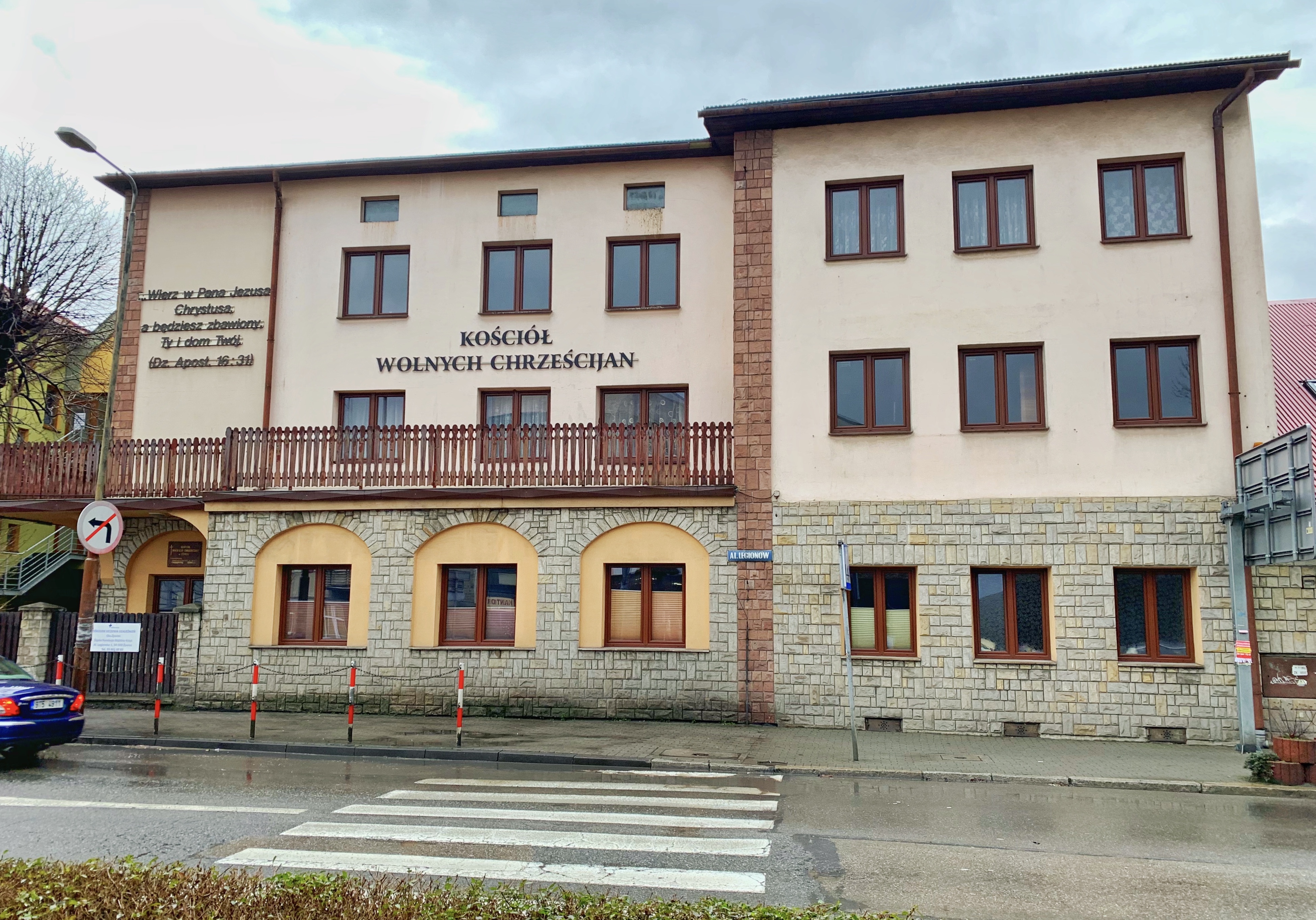 Żywiec - Kościół Wolnych Chrześcijan